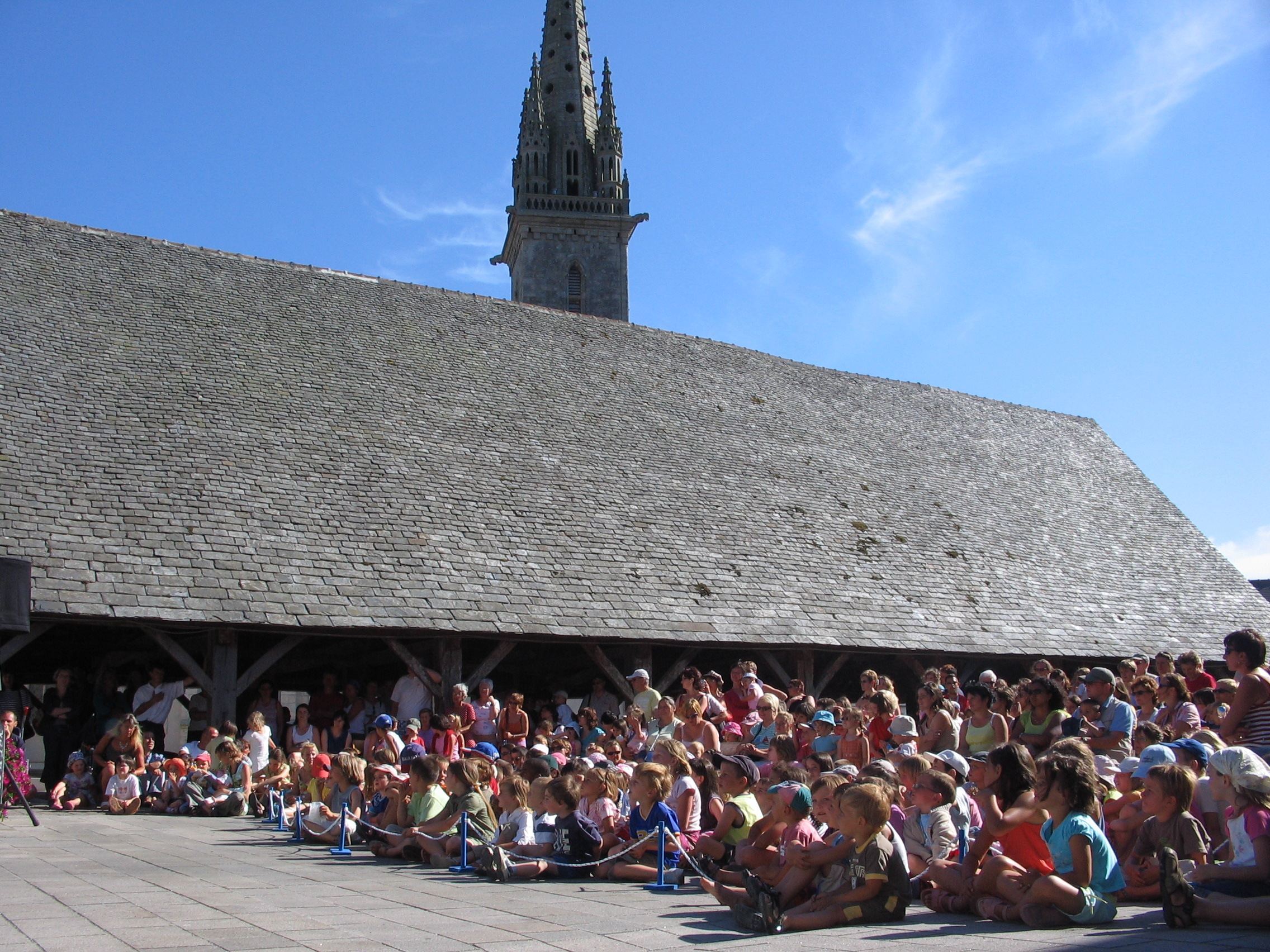 animation estivale réservée aux enfants dans la commune de Plouescat, place des Halles.